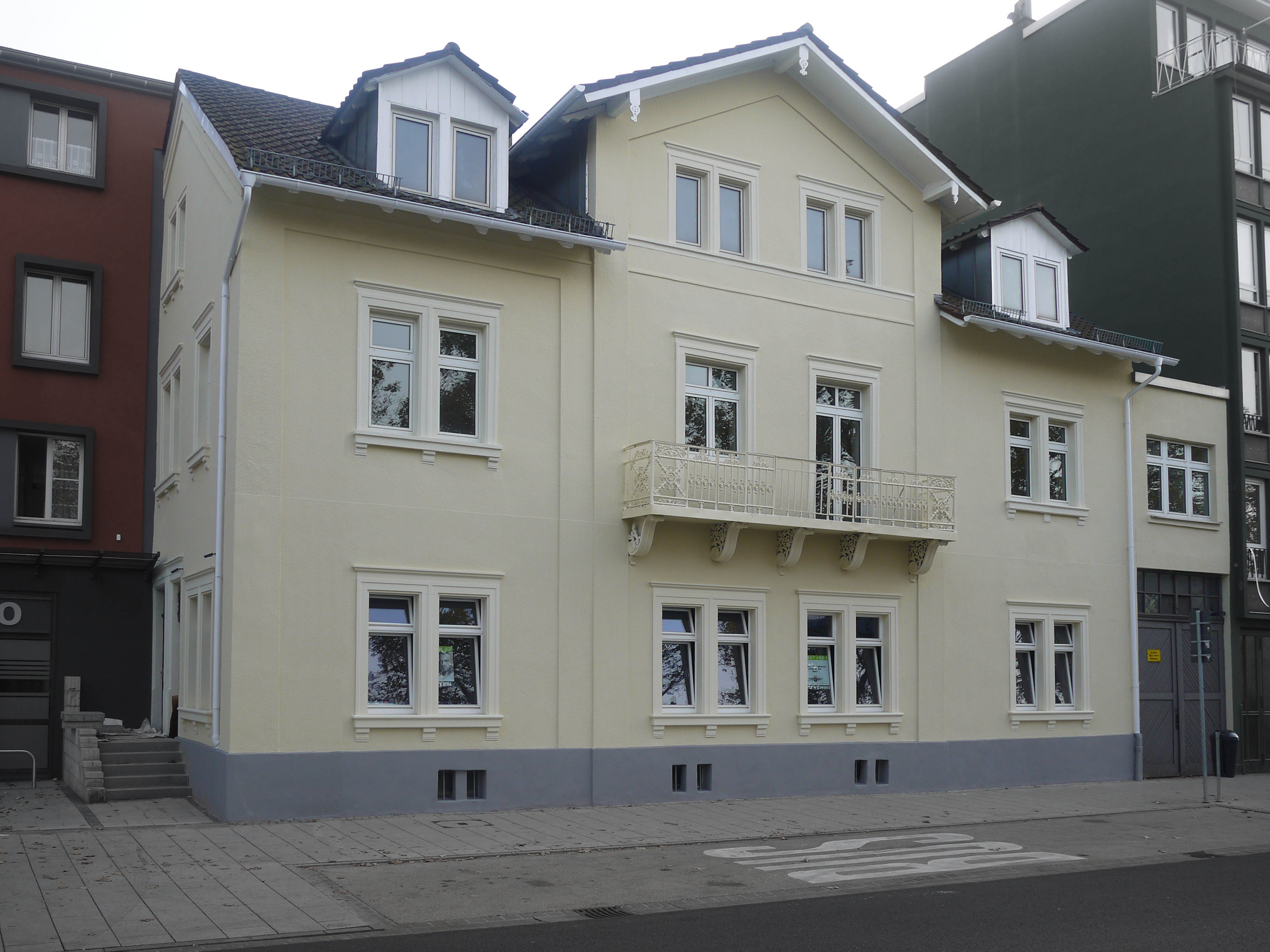 Ludwigstraße 19 in Aschaffenburg, (Geburtshaus des Malers Ernst Ludwig Kirchner (1880-1938), denkmalgeschützt